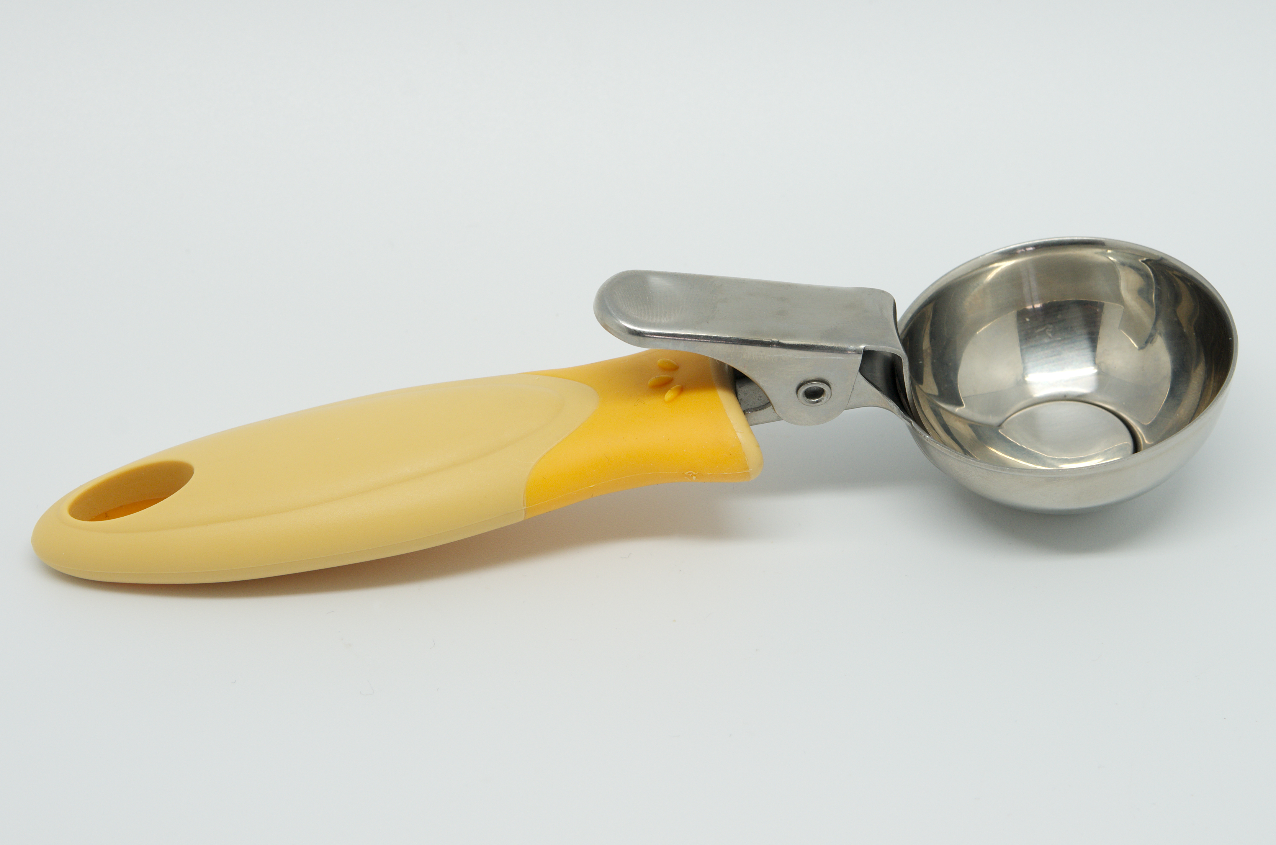 Cuiller à glace